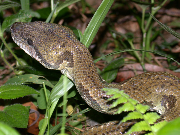 Madagascar Tree Boa (Sanzinia madagascariensis)